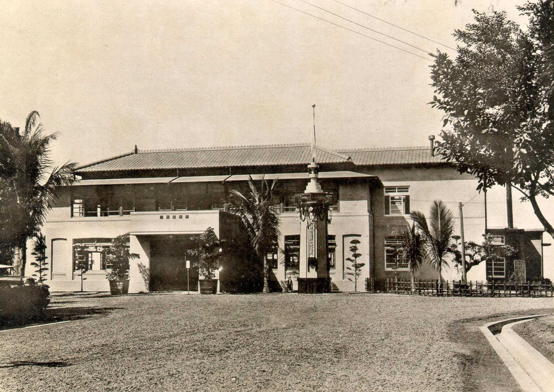 中文（台灣）: 高雄觀光館於1935年建於高雄西子灣，戰後曾作為蔣公行館